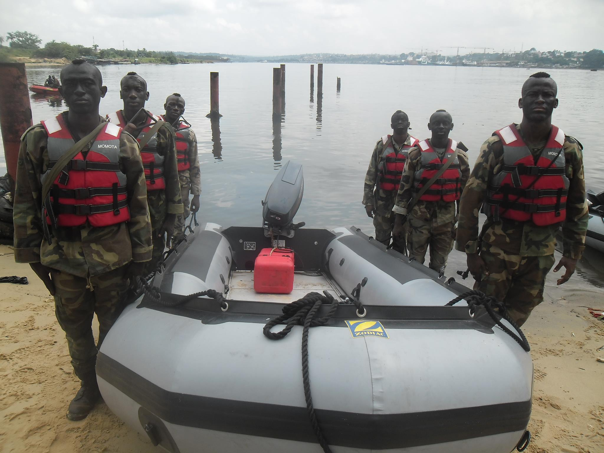 FUMACO de la marine ivoirien